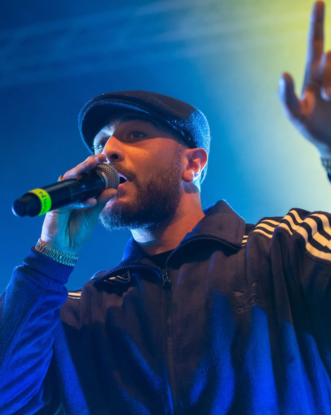 Concertbüro Franken,Konzert,Livekonzert,Livemusik,Löwensaal,Musik,Nima Yaghobi,Nimo